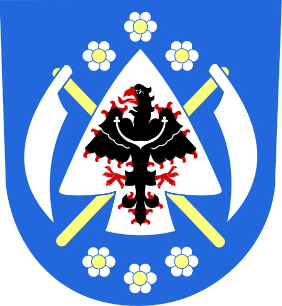 Znak obce Hybrálec